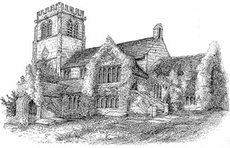 Sketch